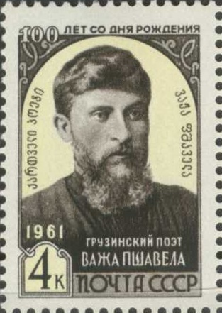 Vazha Pshavela